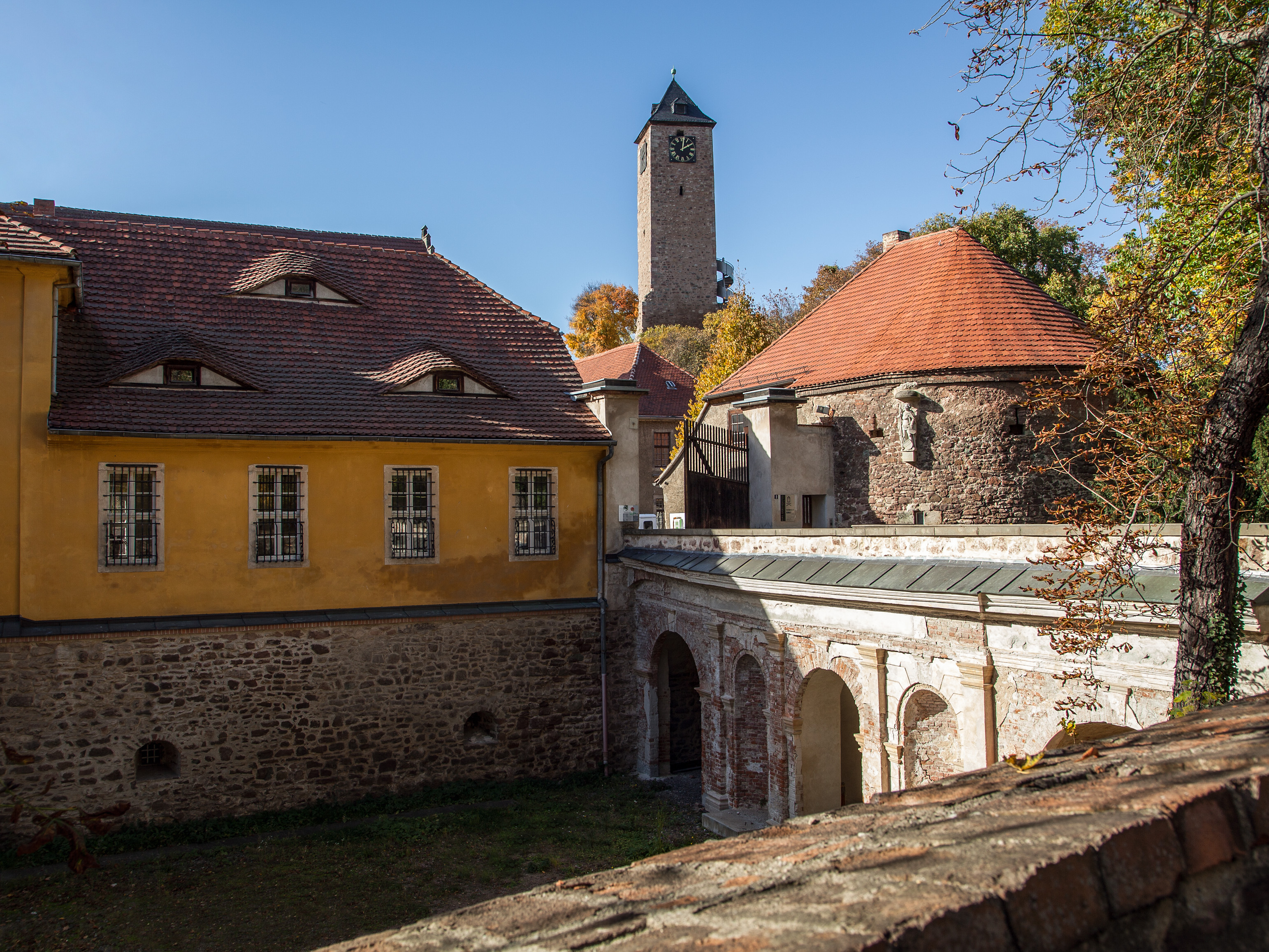 Zugang zum Campus mit Blick auf das Herrenhaus, das Pförtnerhaus und die Oberburg Giebichenstein.